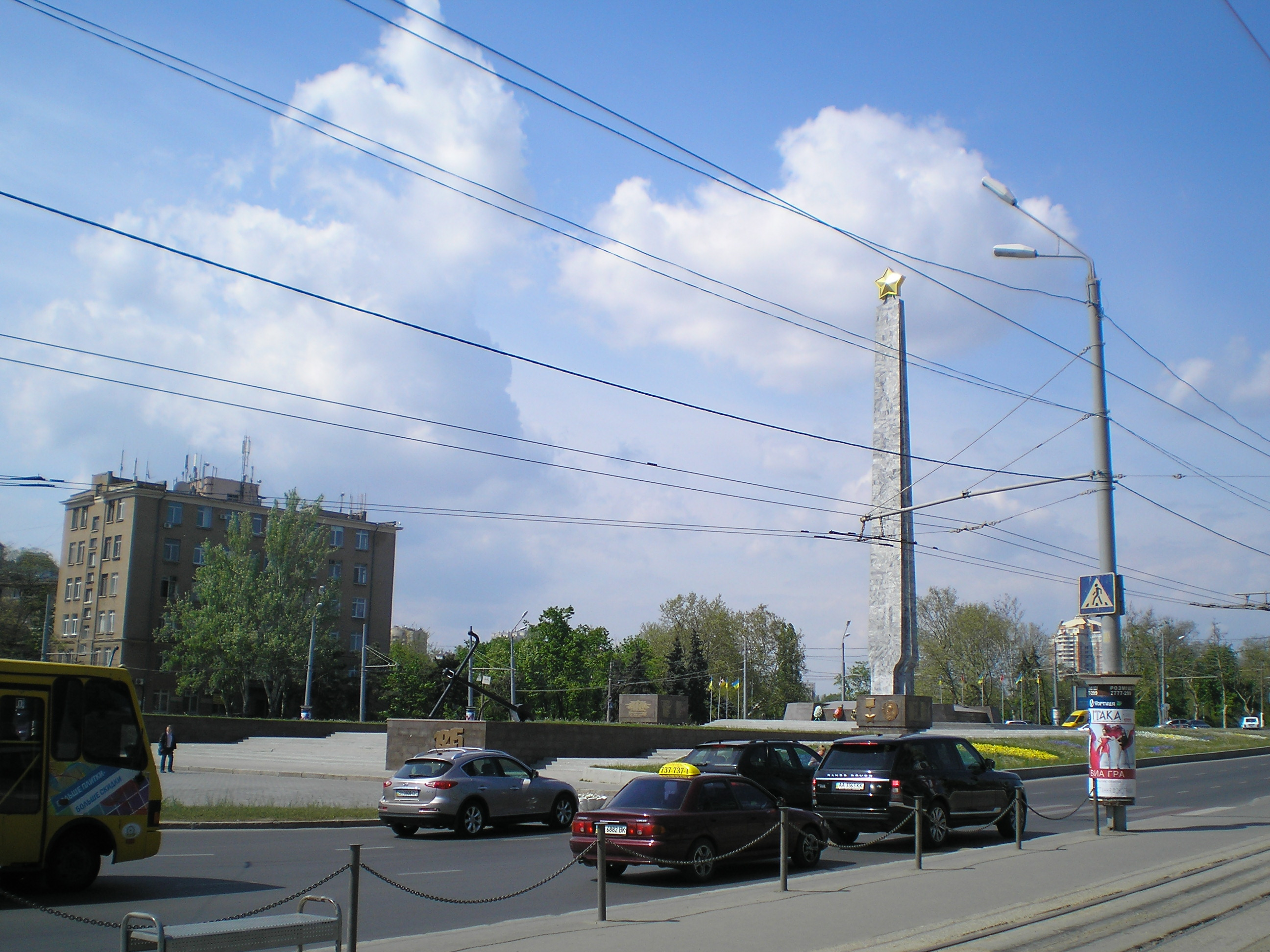 Площа 10-го квітня, Одеса